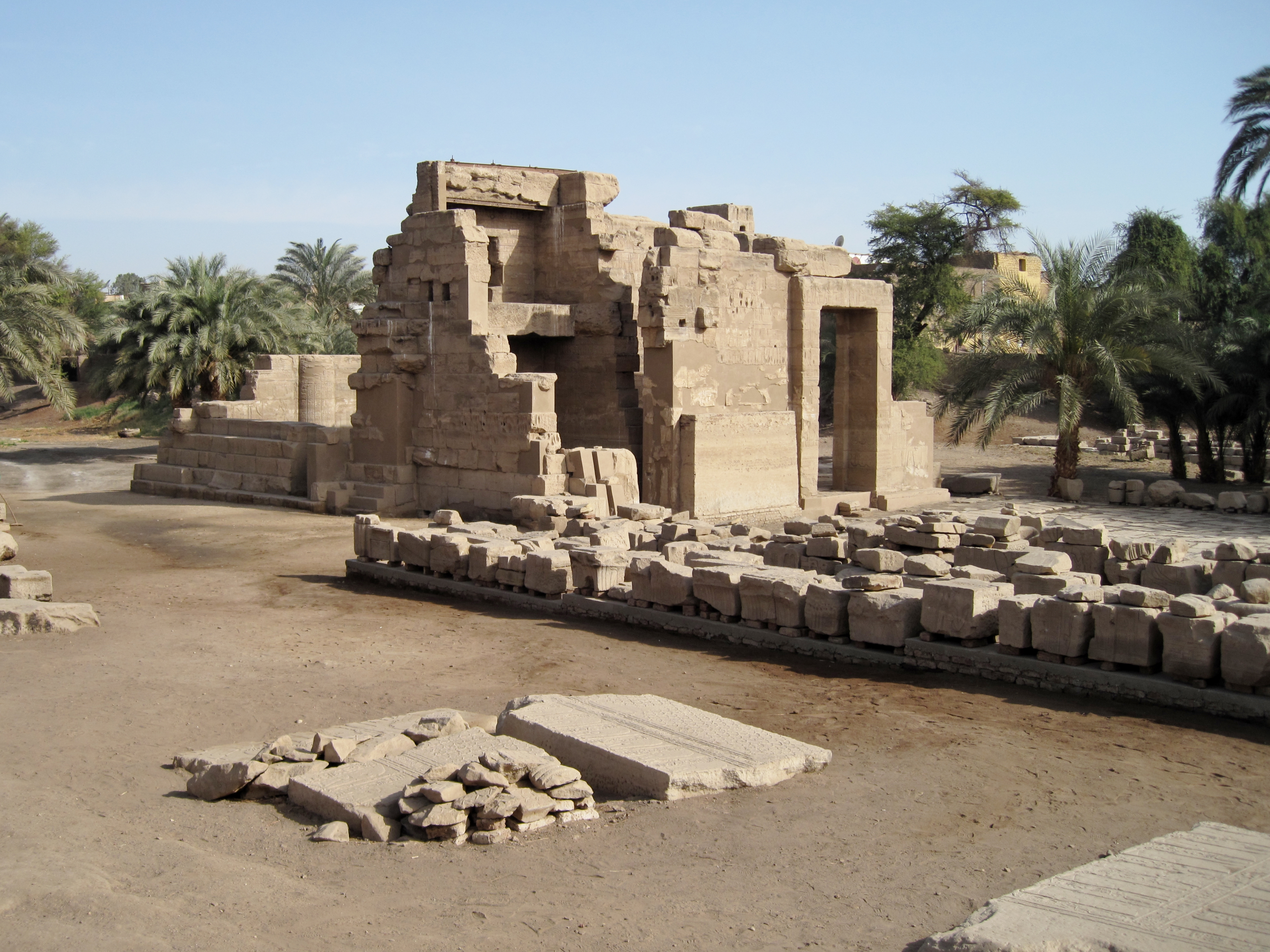 Blick auf den Month-Tempel von el-Tod, Ägypten